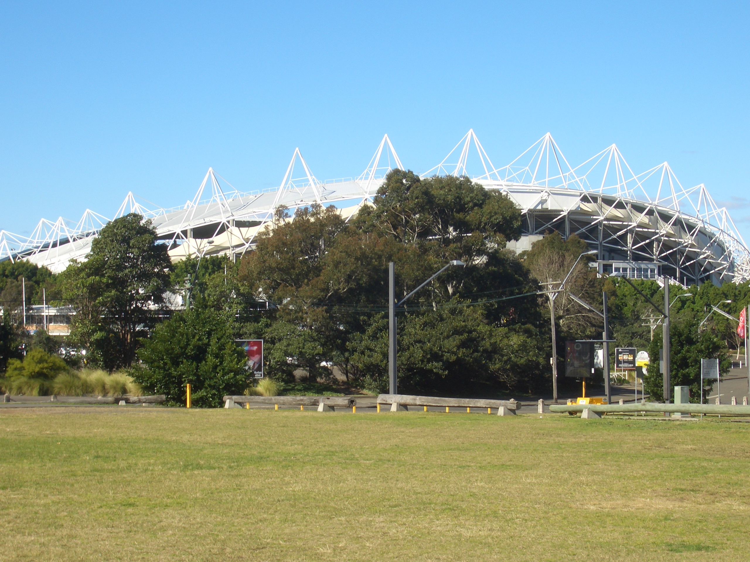 Moore Park, Aussie Stadium, Sydney Football Stadium